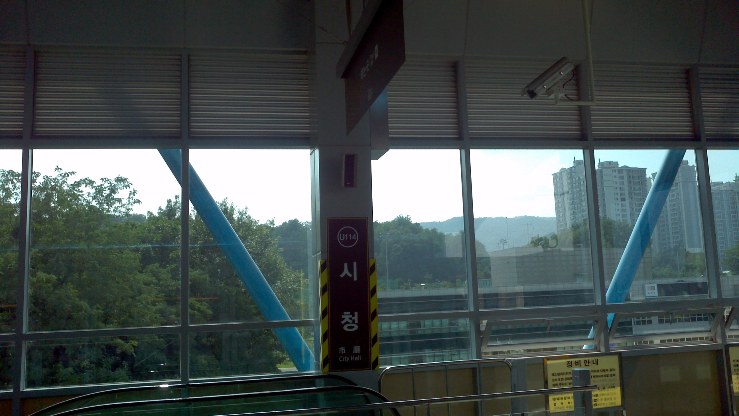 범골역 역명판